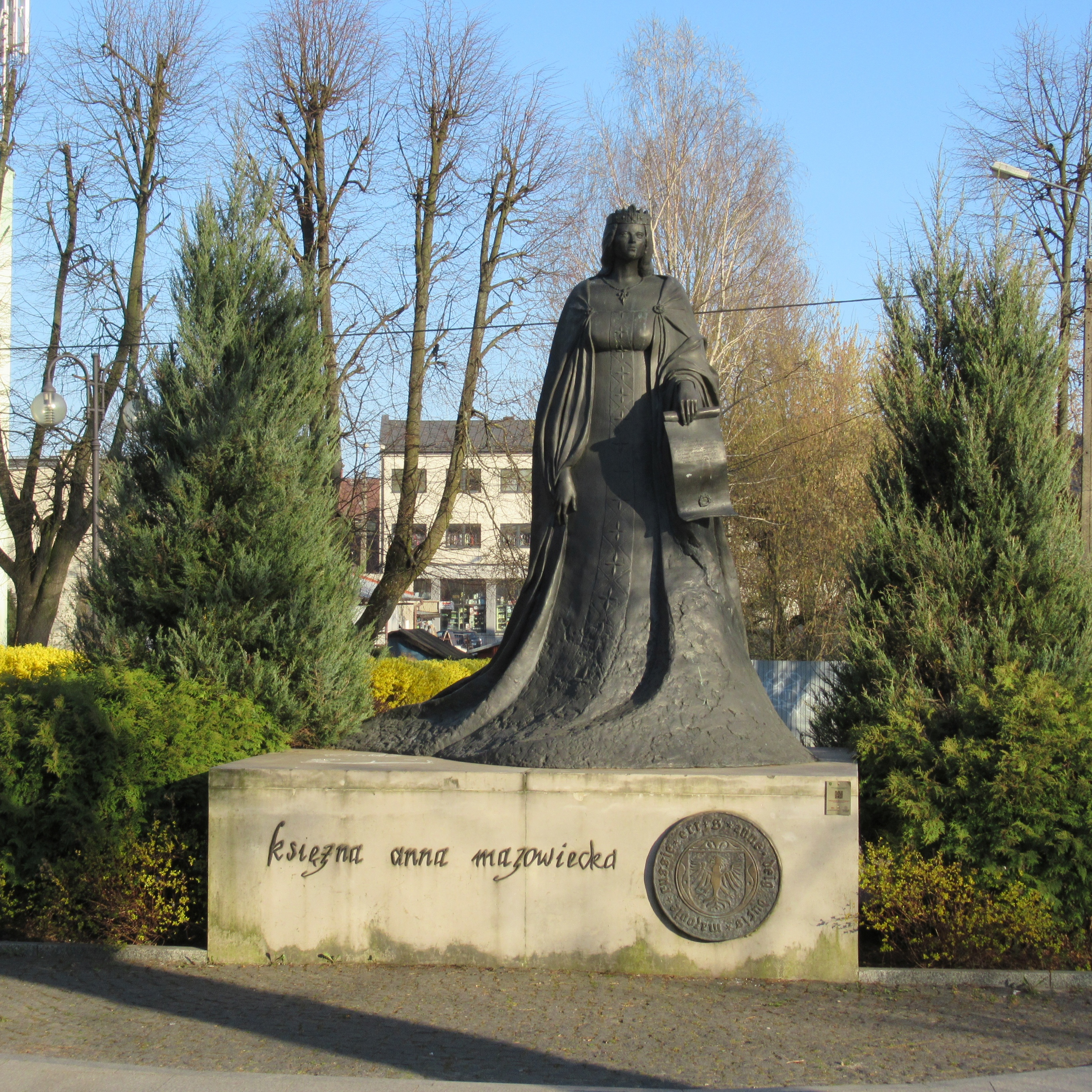 Ostrów Mazowiecka (woj. mazowieckie, Polska). Pomnik Anny Radziwiłłówny (1476‒1522), regentki Mazowsza, autorstwa Mirosławy Skoczek.